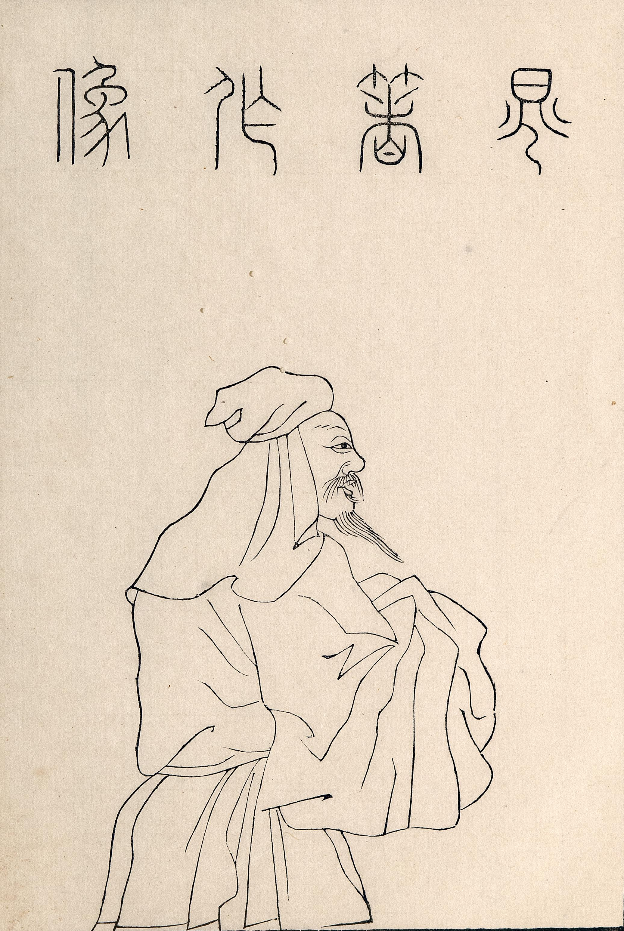 晁補之取自清顾沅辑，道光十年刻本《古圣贤像传略》